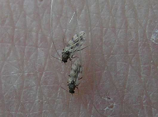 Från mina egna bilder. Fotograf: Tommy Halvarsson